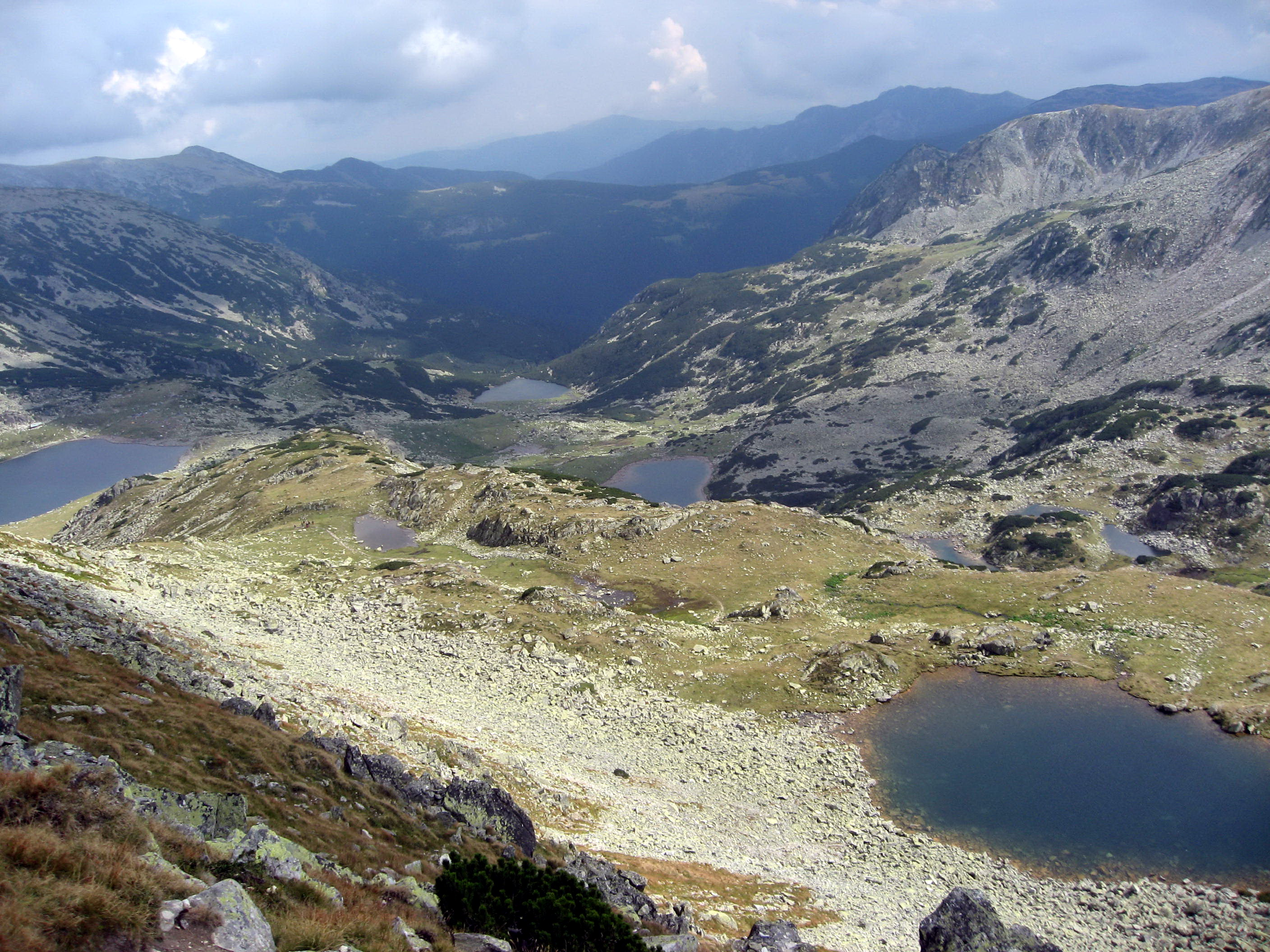 Retezat, jezera